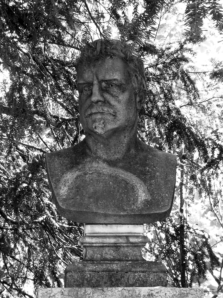 Wilhelm Klein, Regierungsrat, 1825-1887, Friedhof Wolfgottesacker, Basel